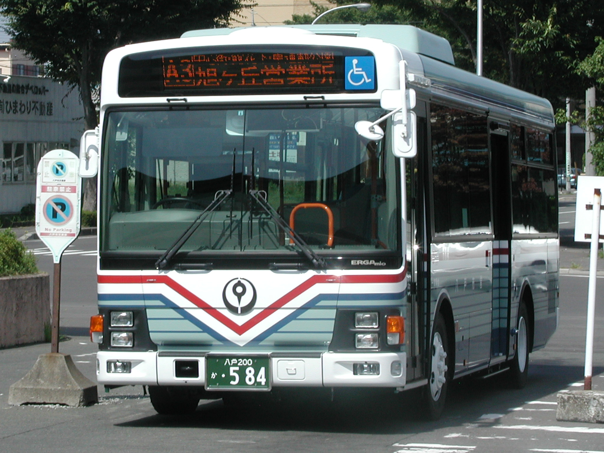 八戸市交通部 いすゞ・エルガミオワンステップ(PDG-LR234J2/自主発注)